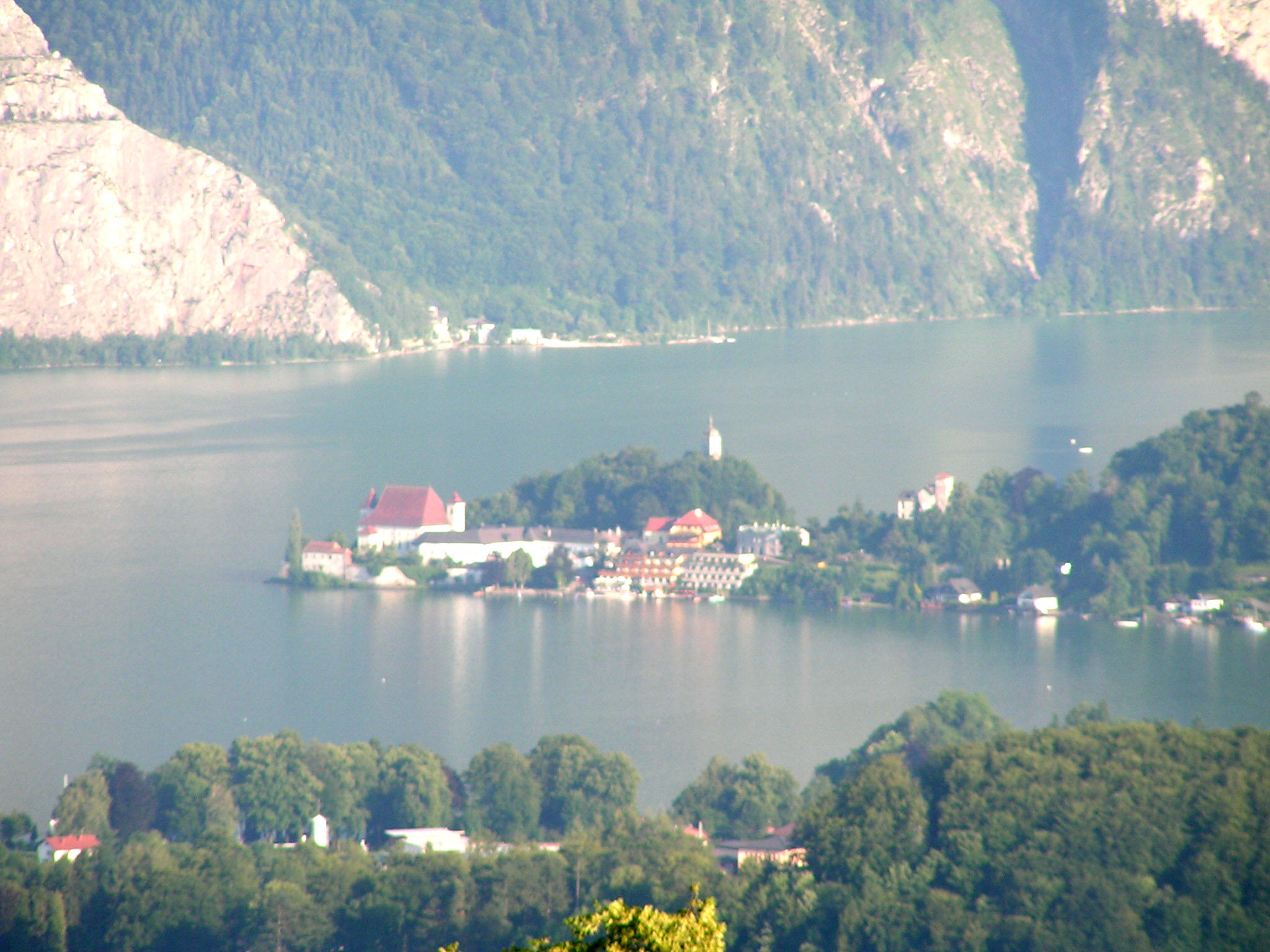 Traunkirchen und der Traunsee, vom Grasberg aus gesehen